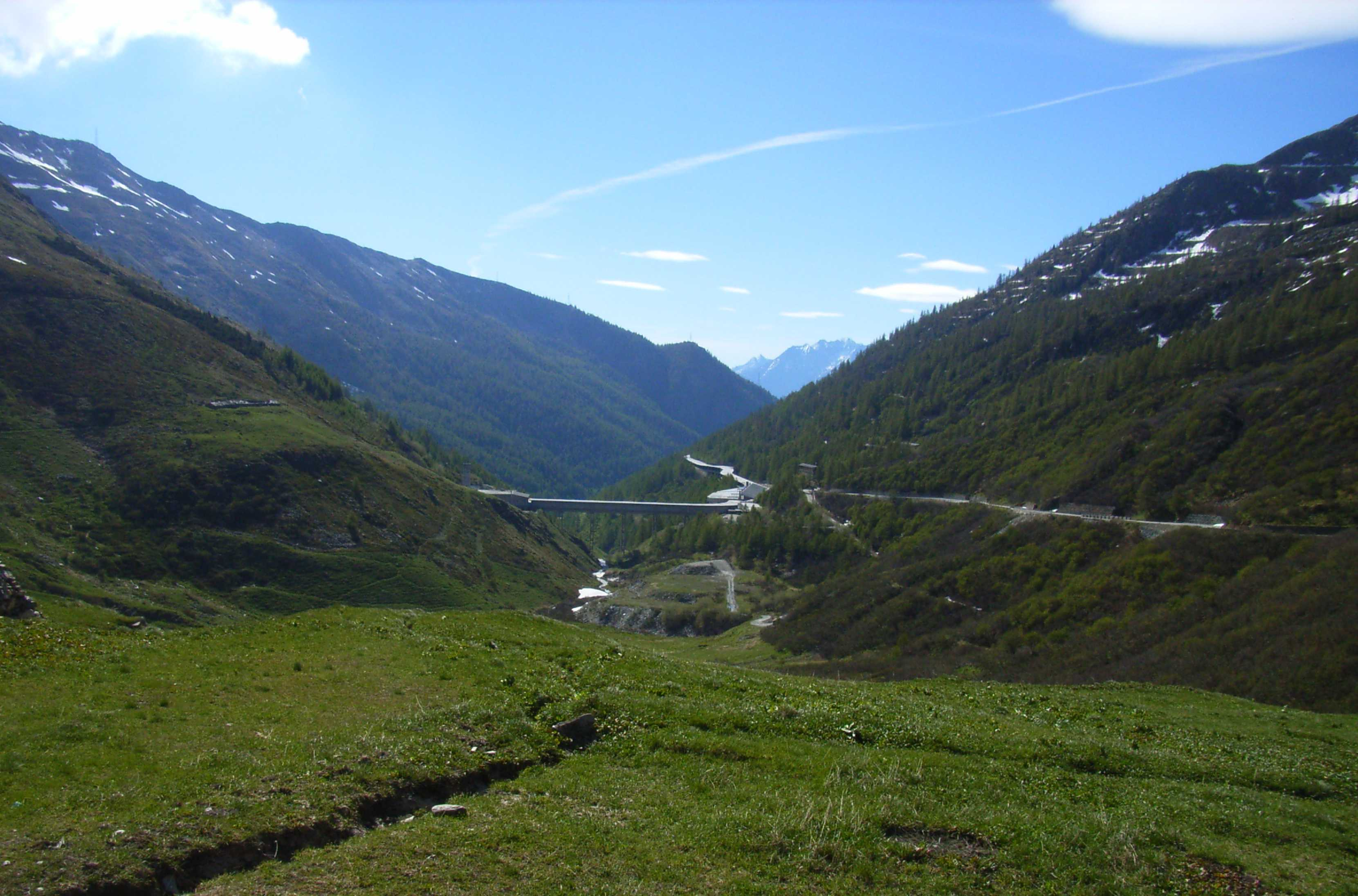 Valle del Gran San Bernardo, Ausfahrt des St-Bernhard-Tunnel mit Straßengalerie der E 27 (Region Aoste, Italien)